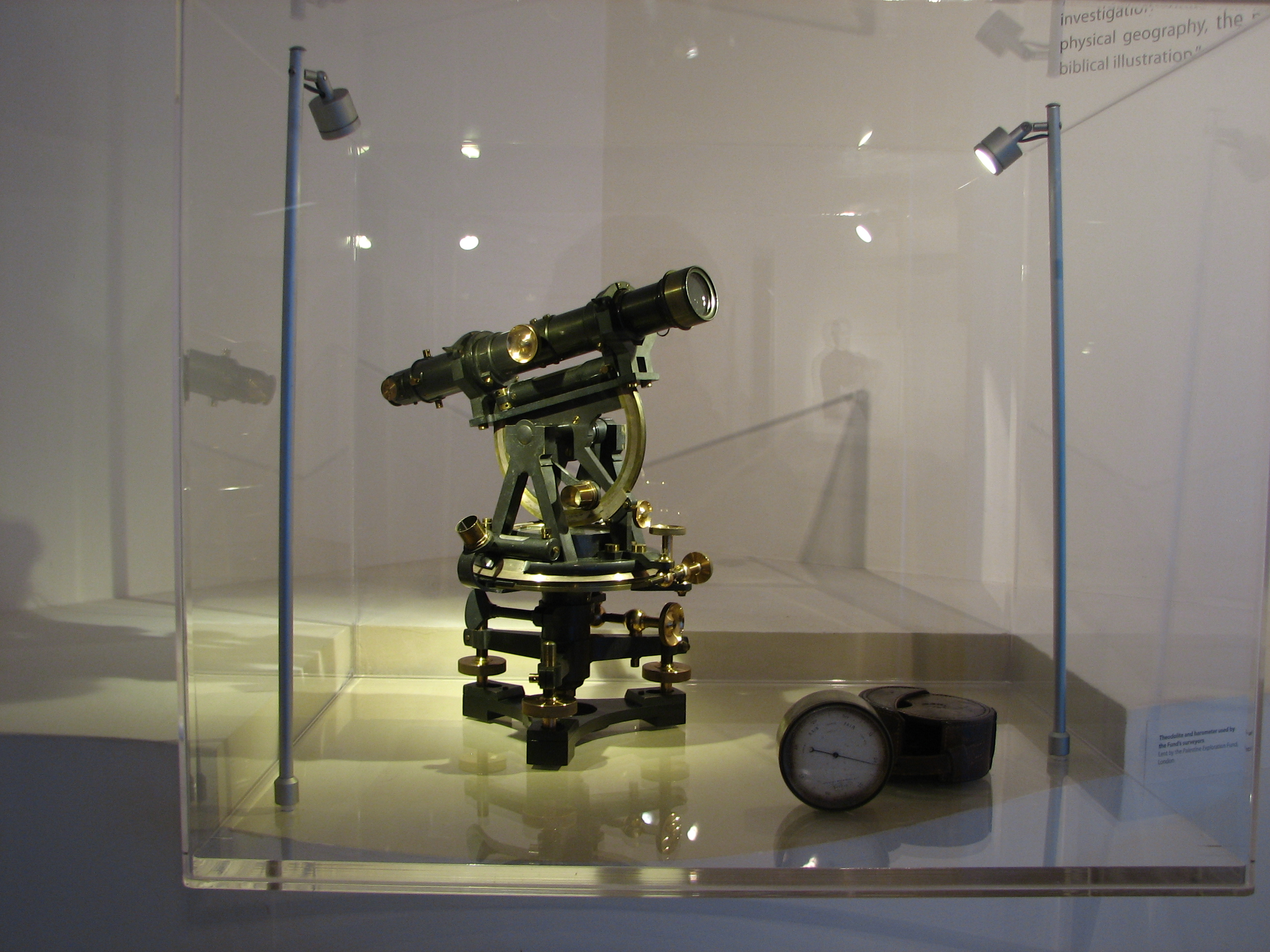 Palestine Exploration Fund, The Survey of Western Palestine equipment ציוד ששימש את עורכי סקר ארץ ישראל המערבית מטעם הקרן לחקר ארץ ישראל שנעשה בשנות השבעים של המאה התשעה עשרה הציוד מוצג במוזיון ישראל. נמסר על ידי הקרן שמושבה בלונדון תיאודוליט וברומטר ששימשו את עורכי הסקר